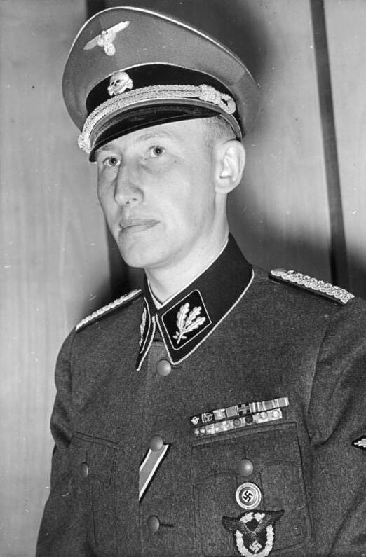 Zentralbild 28.8.1940 SS- Gruppenführer Heydrich, Präsident der Intern. kriminalpolizeilichen Kommission. Der Chef der Sicherheitspolizei und der Sd, SS- Gruppenführer Heydrich, hat die Leitung der Internationalen kriminalpolizeilichen Kommission als deren Präsident übernommen.